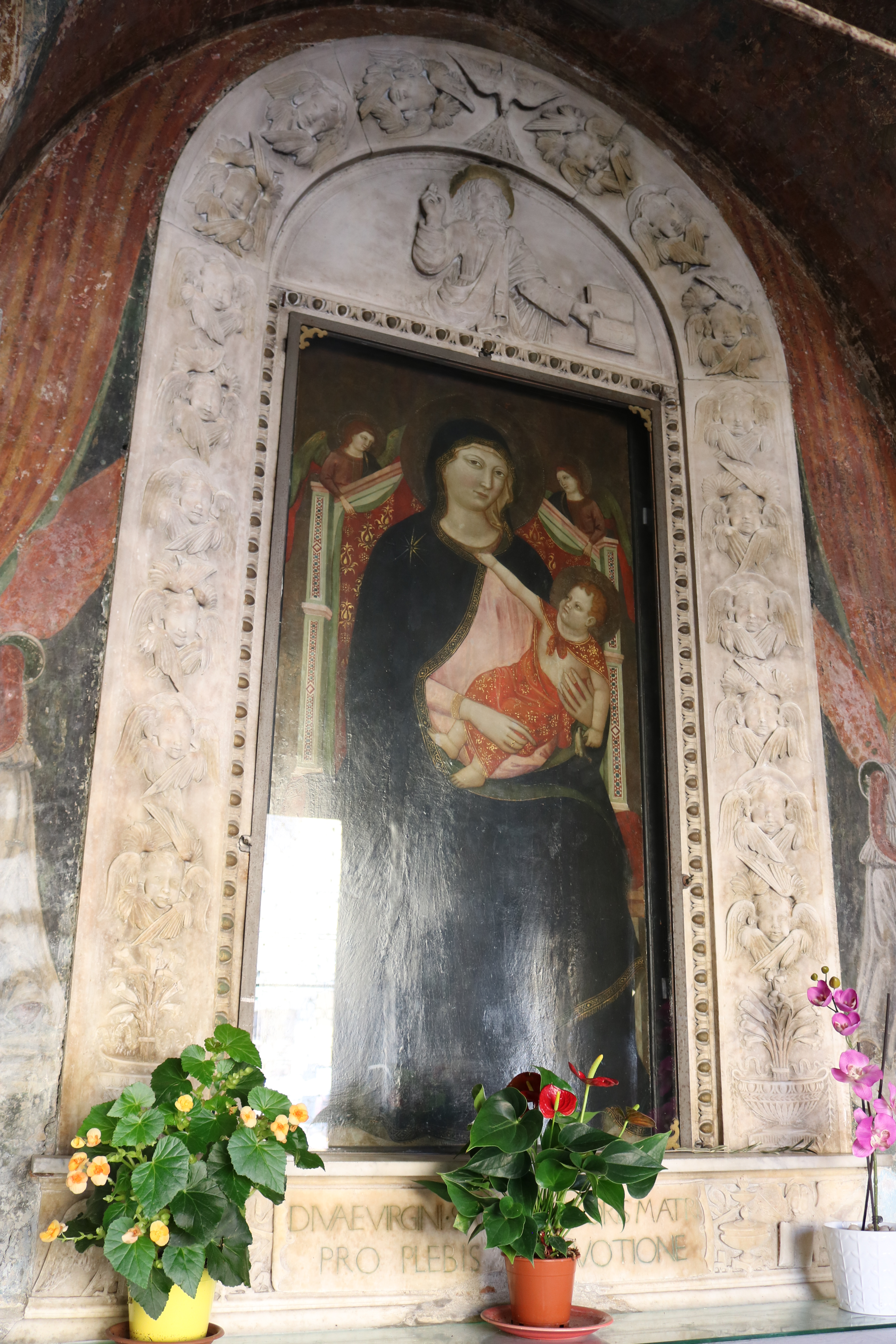 Madonna in trono di Jacopo del Casentino - Cappella della Madonna di Piazza (Scarperia)